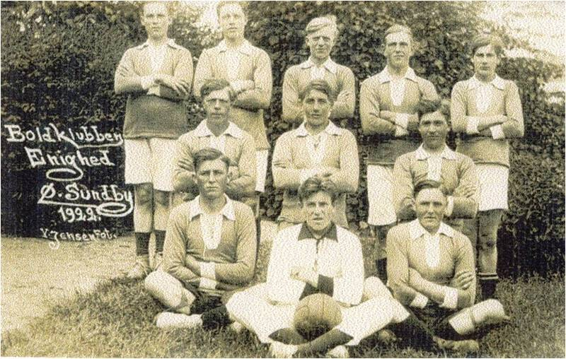 ØB Enigheden